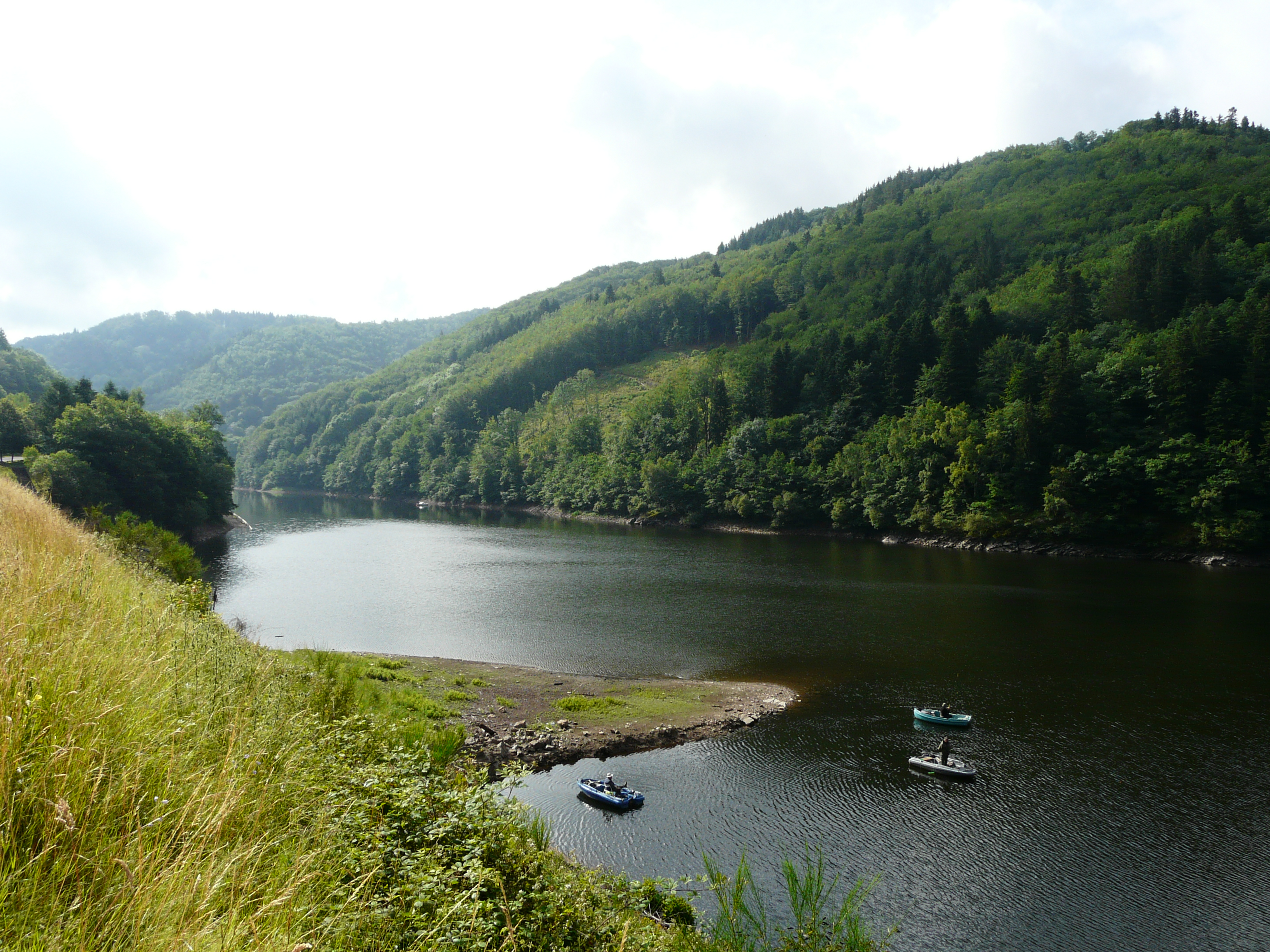 Le lac de Bort-les-Orgues vu depuis le pont d'Arpiat ; au premier plan la Dordogne (commune de Confolent-Port-Dieu, Corrèze, Limousin) ; au second plan, après les bateaux, la vallée de la Burande entre les communes de Singles (à gauche) et Larodde (à droite) dans le Puy-de-Dôme (Auvergne).